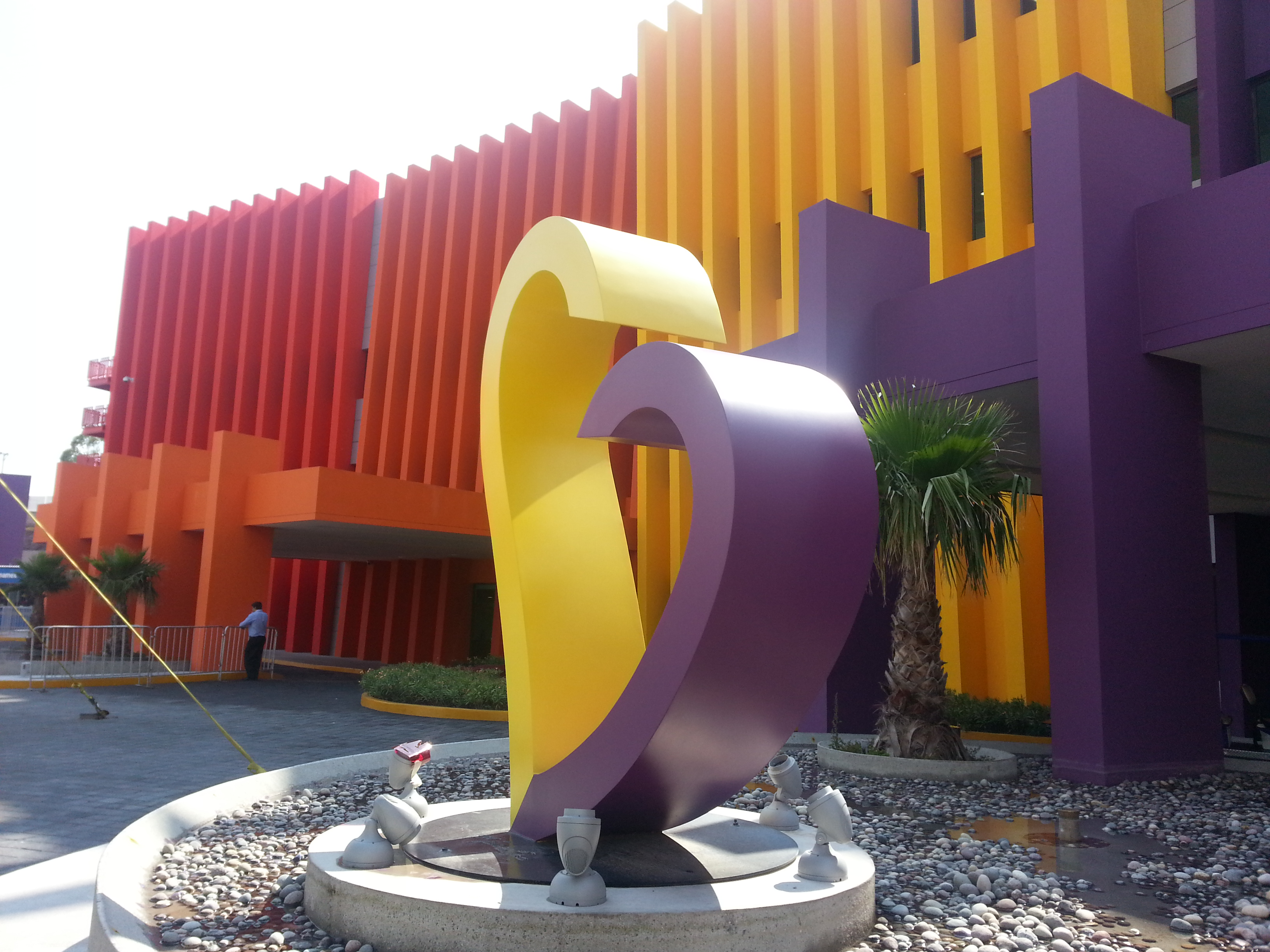 Fachada del Hospital Infantil Teletón de Oncología (HITO)